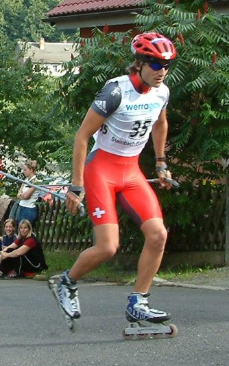 Ronny Herr during the Sommer Gand Prix in Steinbach-Hallenberg